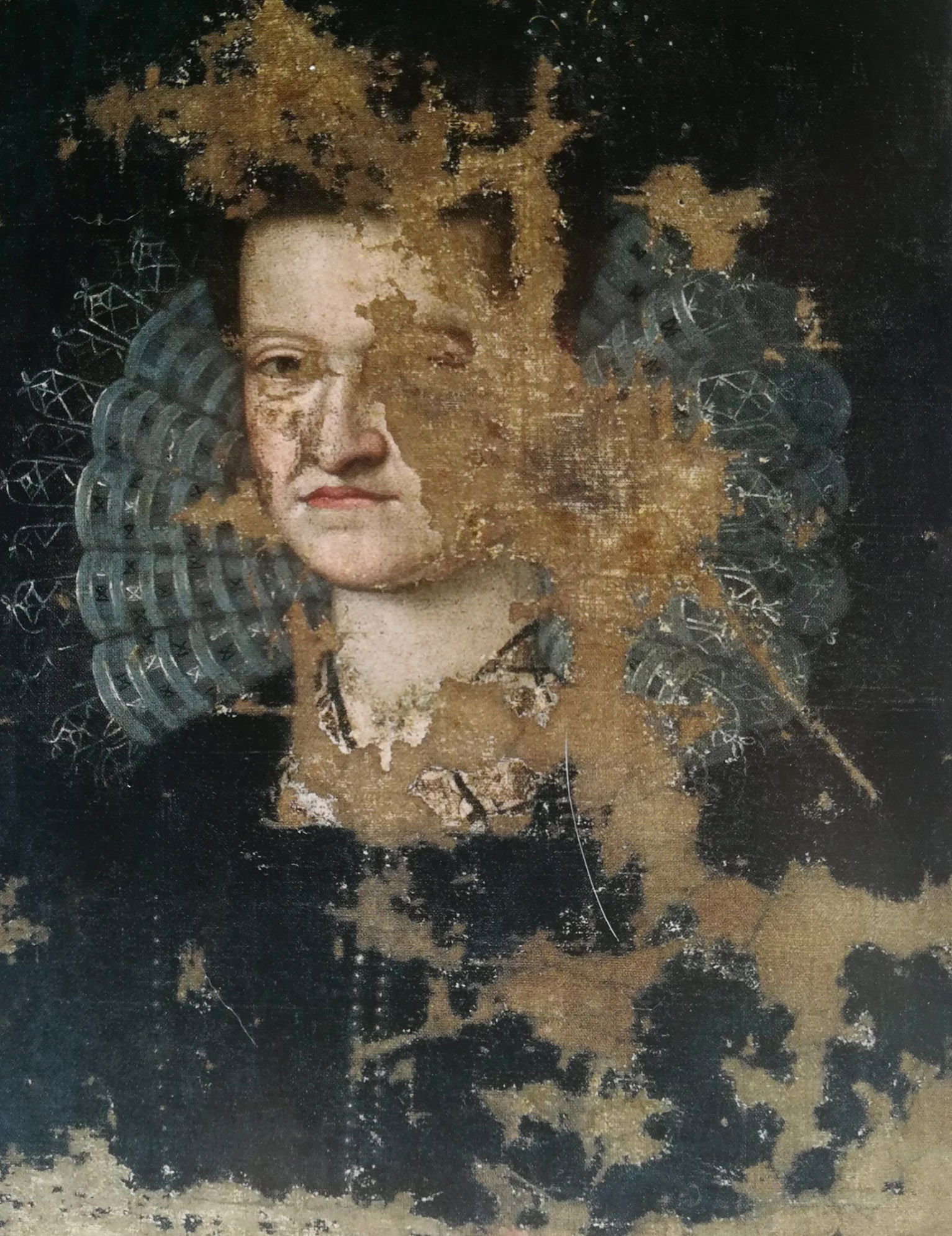 Virginia de' Medici (1568-1615), prima duchessa di Modena Capitale dal 1598 al 1615. Moglie di Cesare d'Este, duca di Modena e Reggio col dominio della Garfagnana.